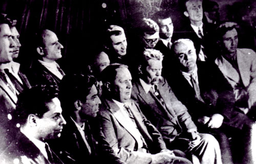 Əli, Nazim, Səməd Vurğun, Aleksey Tolstoy, Maksim Qorki, Salman Mümtaz, Məmməd Kazım Ələkbərli